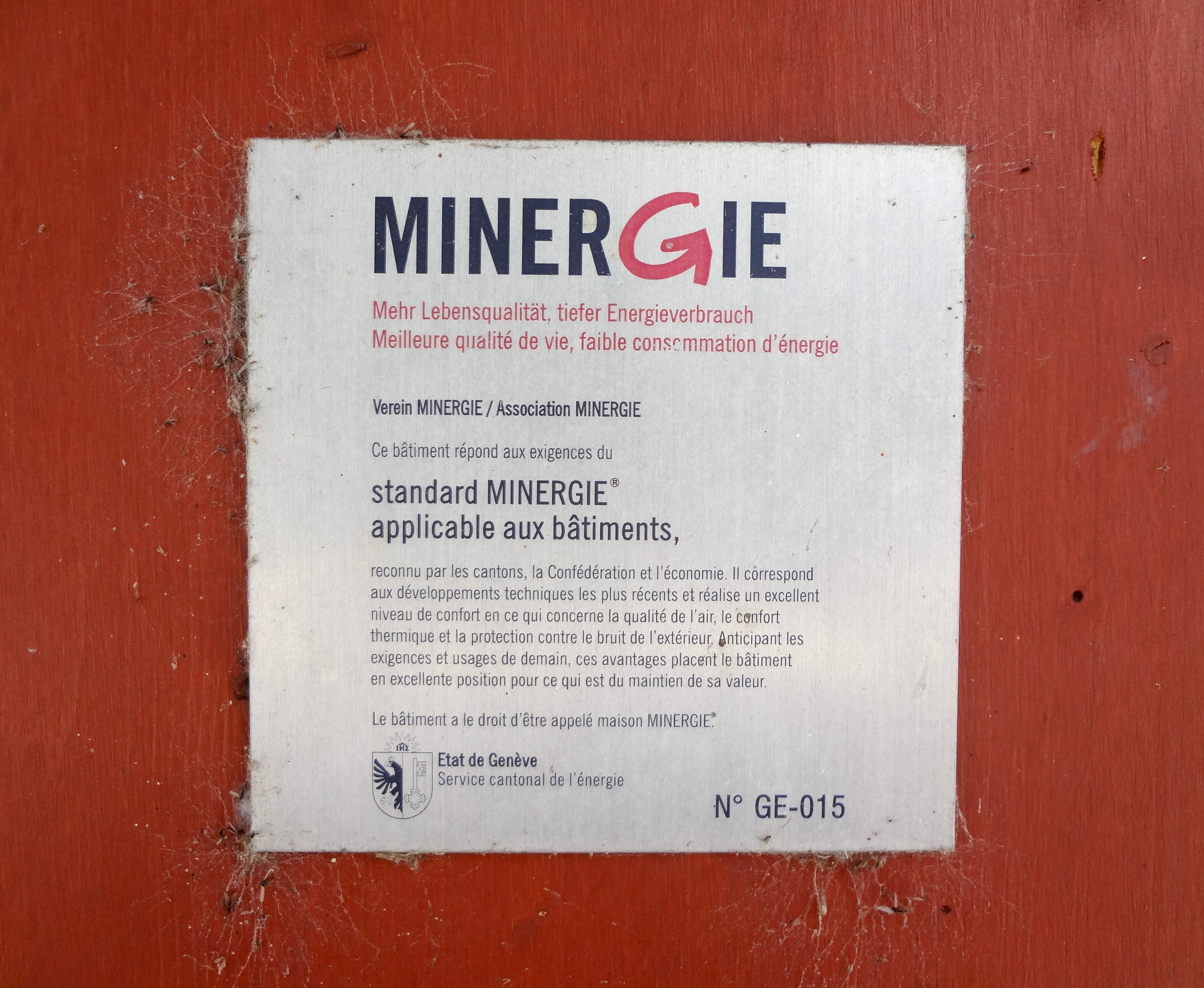 « Espace de vie enfantine Carfagni-Chateaubriand », crèche aux Pâquis, à Genève.